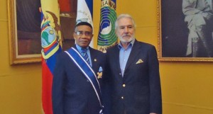 El embajador ecuatoriano, Antonio Preciado, recibe la condecoración: “José de Marcoleta en el Grado de Gran Cruz”; que es el máximo galardón con el que se distingue a los diplomáticos por sus méritos en el desempeño de su labor durante su misión en Nicaragua, el cual fue entregado por Samuel Santos, Canciller de Nicaragua.